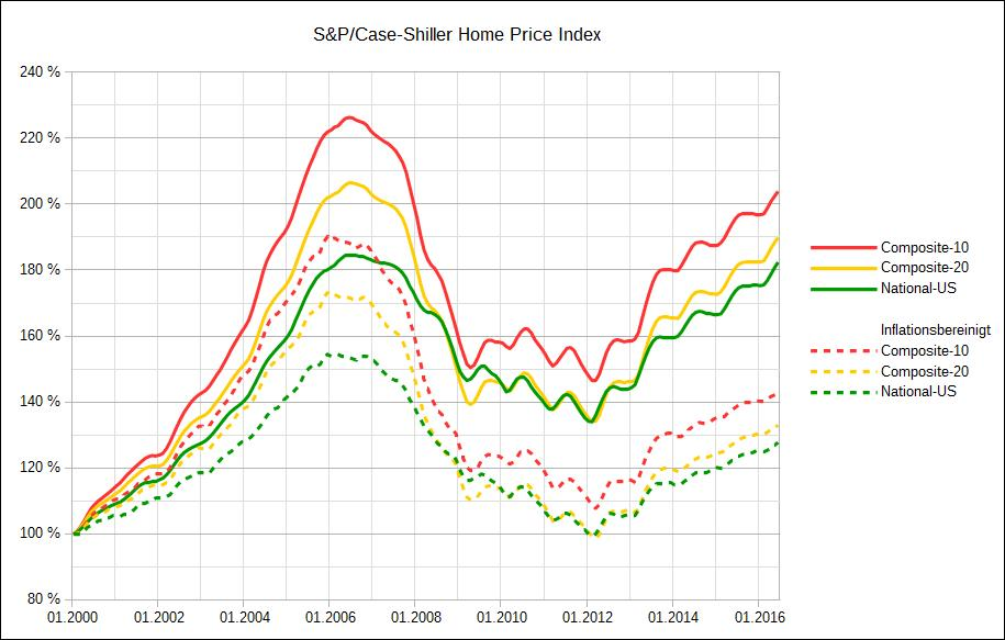 Indice S&P/Case-Shiller Composite correspondant aux prix immobilier de 10 villes puis 20 villes